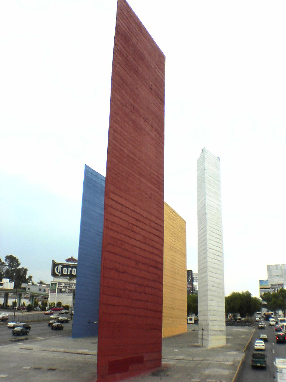 Sculpture Torres de Satélite (1957/8) by Luis Barragán and Mathias Goeritz, in Mexico City; Torres de Satélite, México, D. F.; por Luis Barragán en colaboración con Mathias Goeritz.